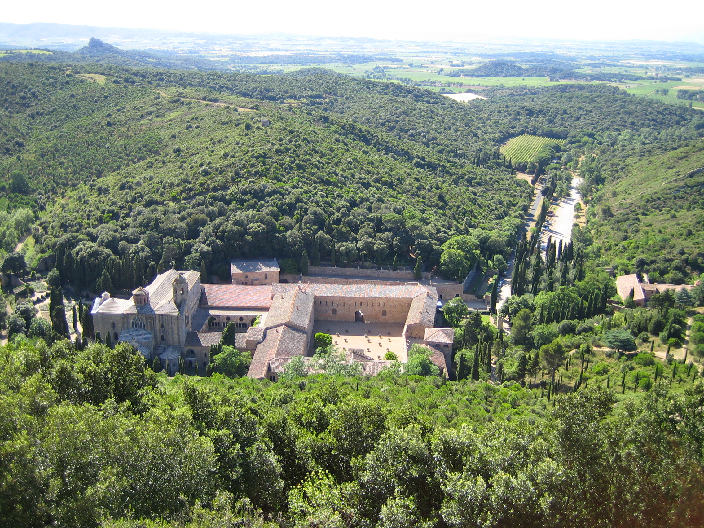 Abbaye Sainte-Marie de Fontfroide, département de l'Aude, France